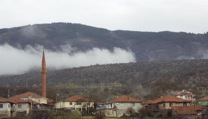 Güzel Köyü